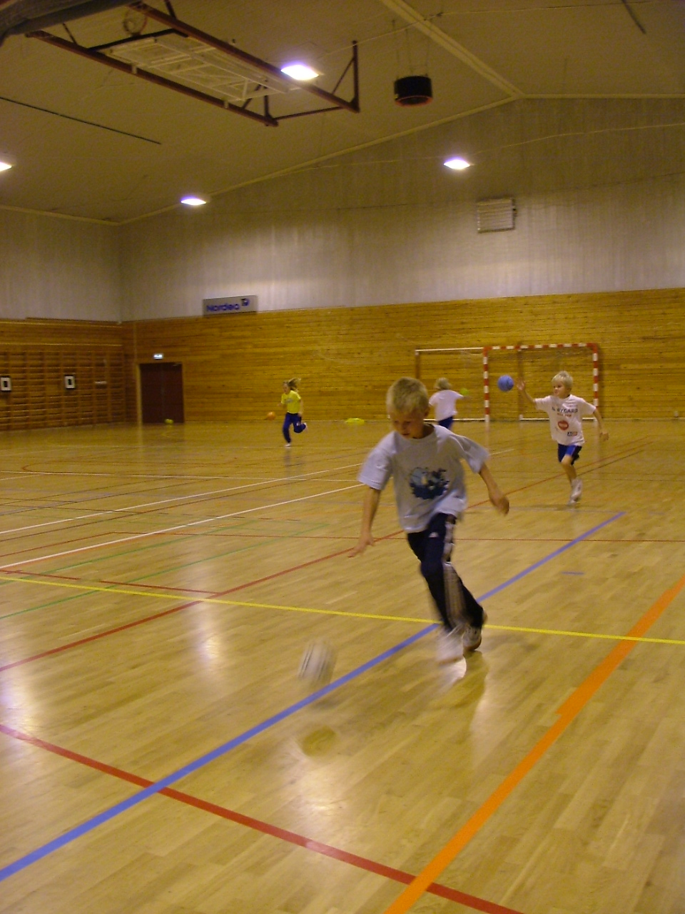 Bildøyhallen innvendig på parketten mot nord. Bildet er tatt under IL Øygard sin håndballskole